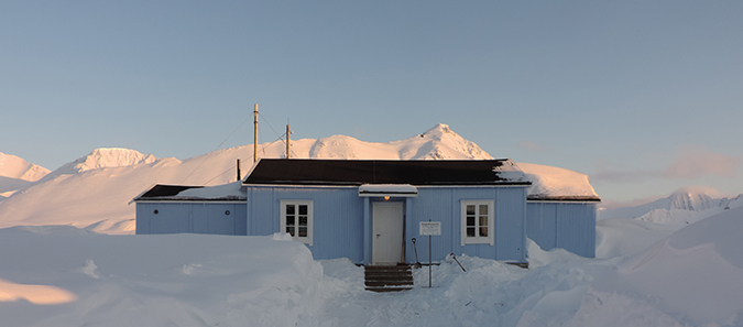 Den gamle telegrafstasjonen ble restaurert i 2013/2014. Telemuseet har laget utstilling og nettsider til stasjonen. Bilde tatt etter restaureringen i 2014.